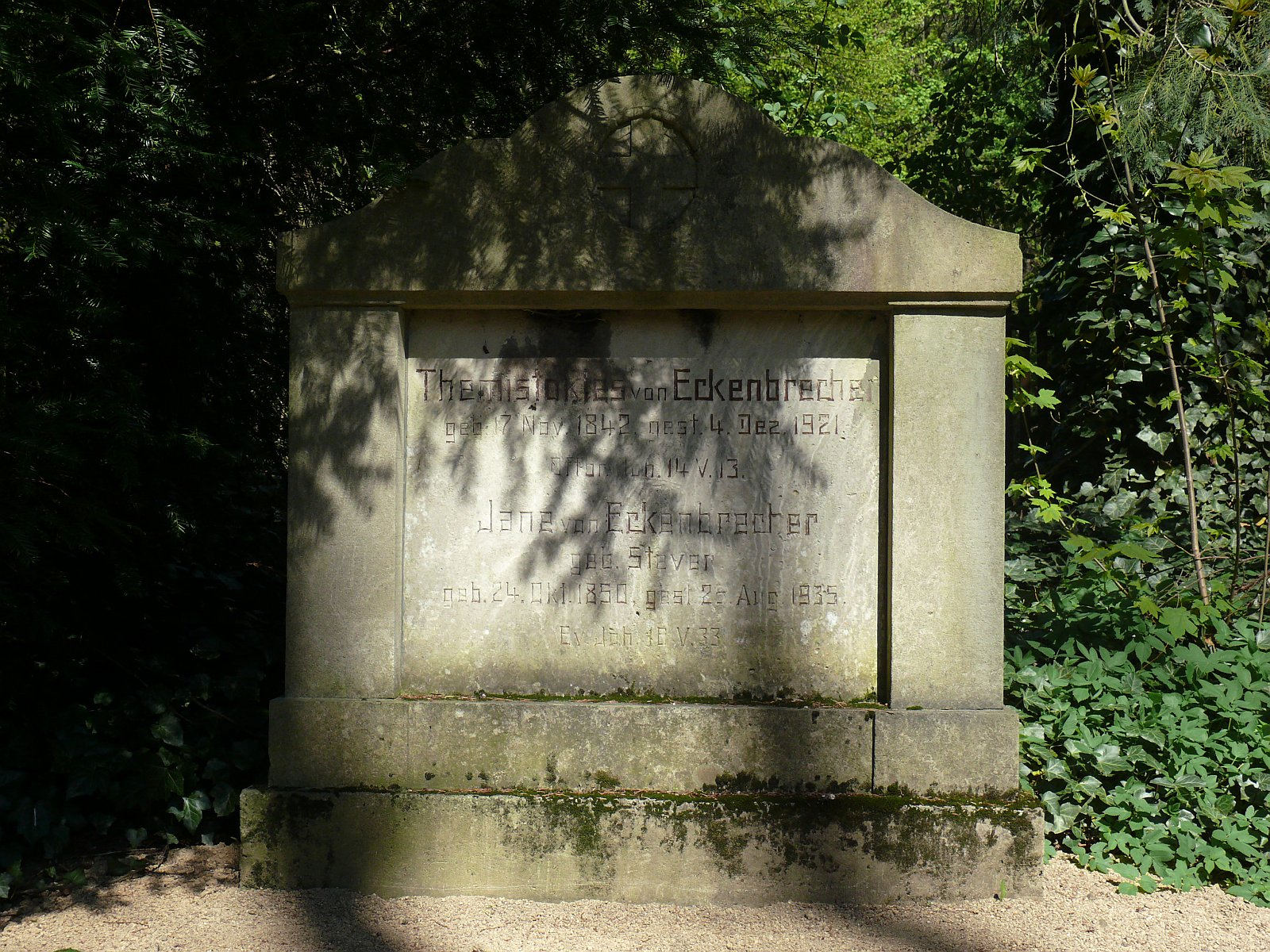 Grabstein des Malers von Themistokles von Eckenbrecher auf dem Alten Friedhof in Goslar